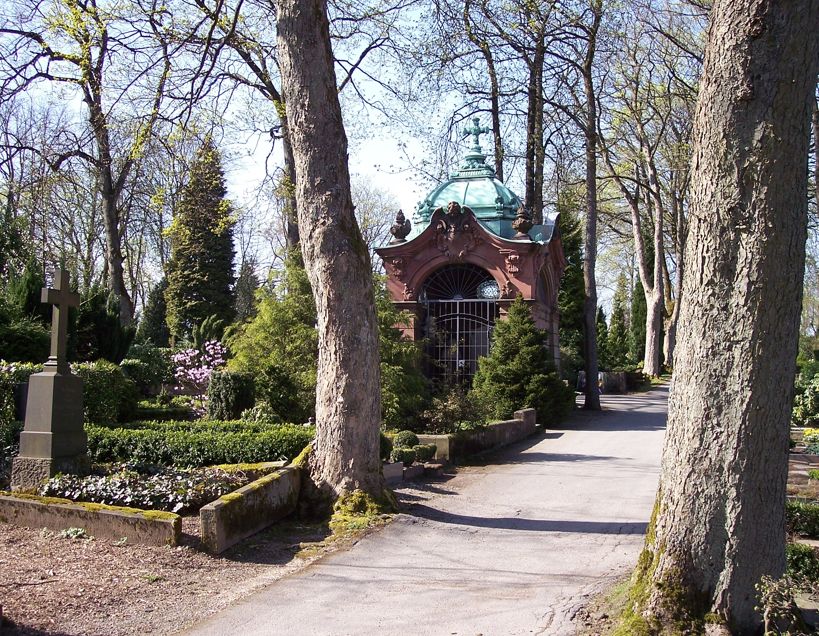 Lüdenscheid, Alter evangelischer Friedhof, Blick auf das Selve-Mausoleum